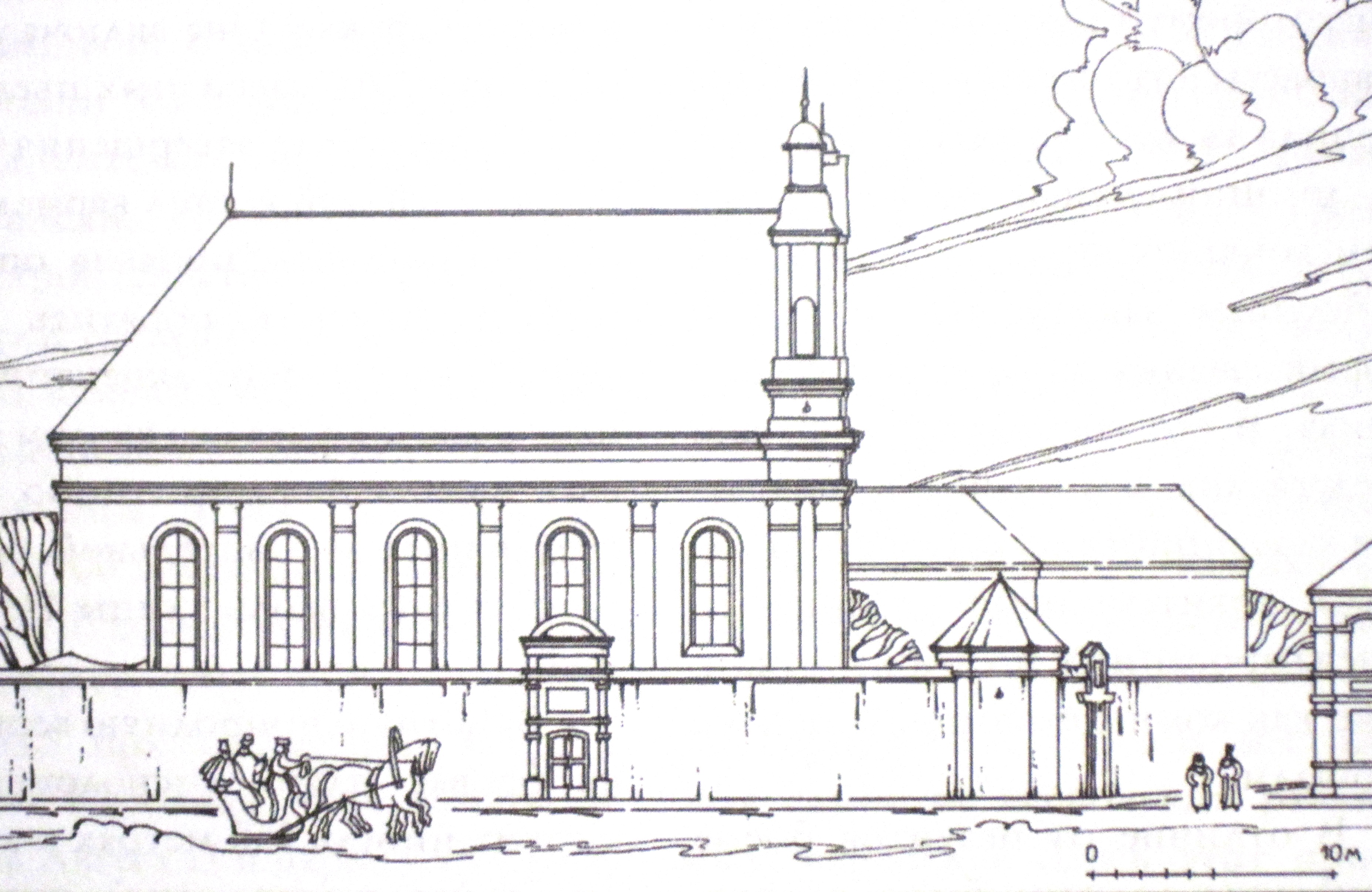 Касцёл брыгітак паводле эскізаў 19 ст.